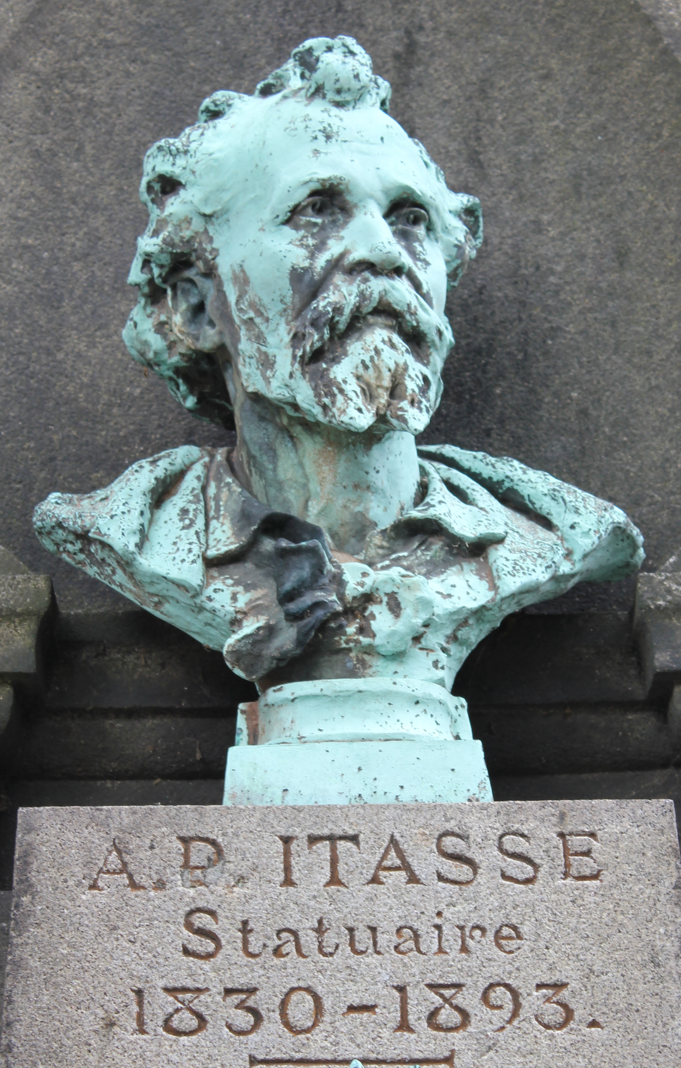 Sépulture des sculpteurs Adolphe Itasse (1829-1893), sa fille Jeanne Itasse-Broquet (1865-1941) et son beau-fils Gaston Broquet (1880-1947). « A la base du piédestal supportant le buste est un petit génie nu, ailé, en bronze (H. 1m), qui s’élève sur la pointe des pieds pour offrir à l’artiste une branche de laurier ; aux pieds du génie sont différents objets en bronze : un maillet de sculpteur, une branche de laurier, une couronne de cyprès dans laquelle passe une banderole portant gravés les mots suivants : « Vénéré père, regretté maître. » Signé : Jeanne Itasse. Fondu par Mce Denonvilliers. » (Jouin 1897)